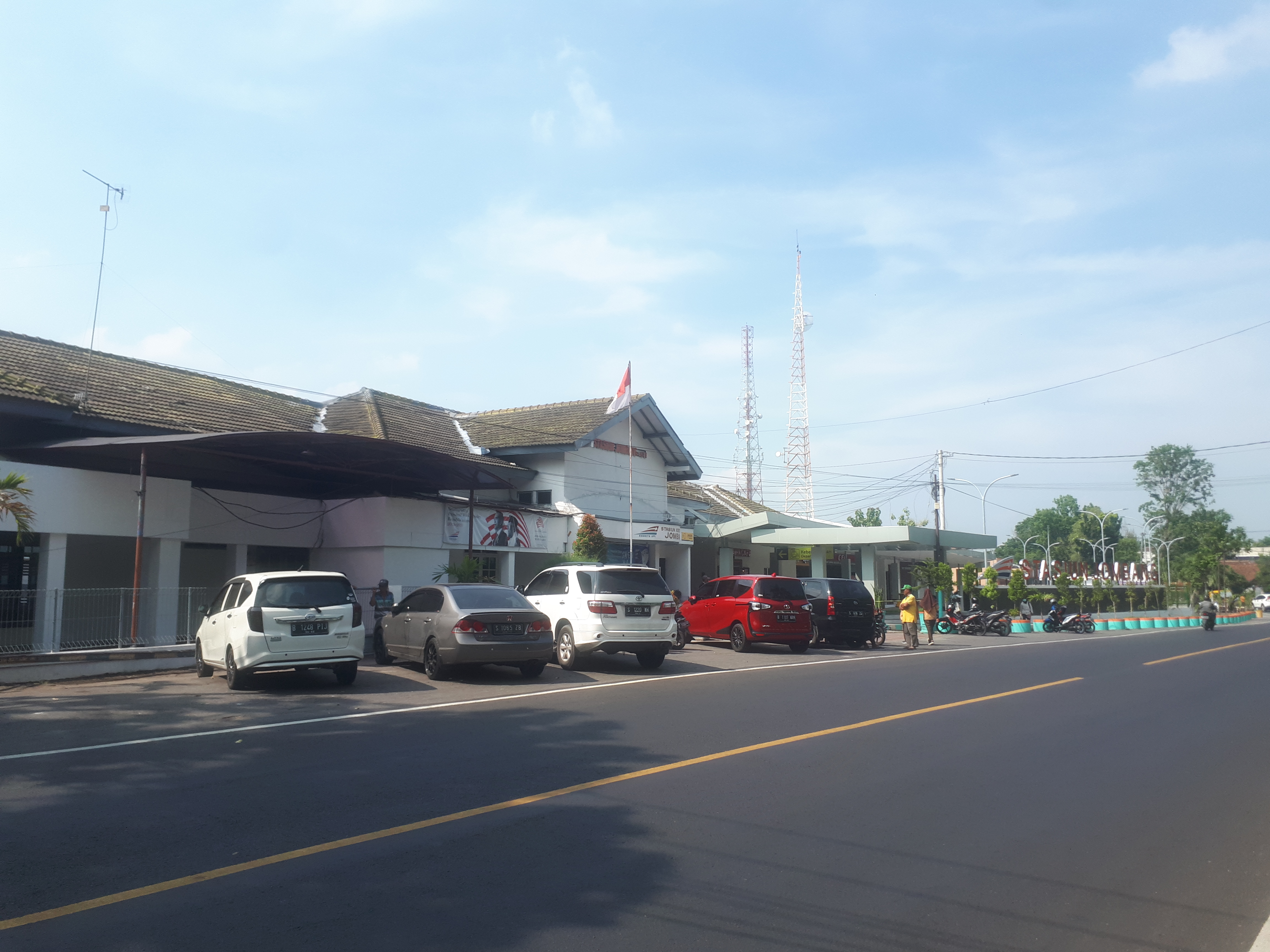 Halaman depan Stasiun Jombang tahun 2019 yang berimpitan dengan jalan raya.